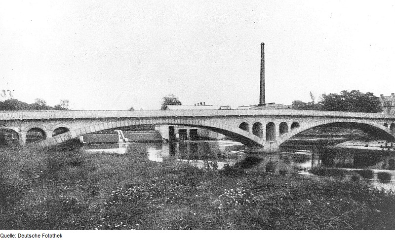 Original image description from the Deutsche Fotothek Rothenburg/O.L.-Lodenau. Brücke über die Neiße bei Lodenau aus: Monopraphien deutscher Landschaften - Die preußische Oberlausitz, 1927